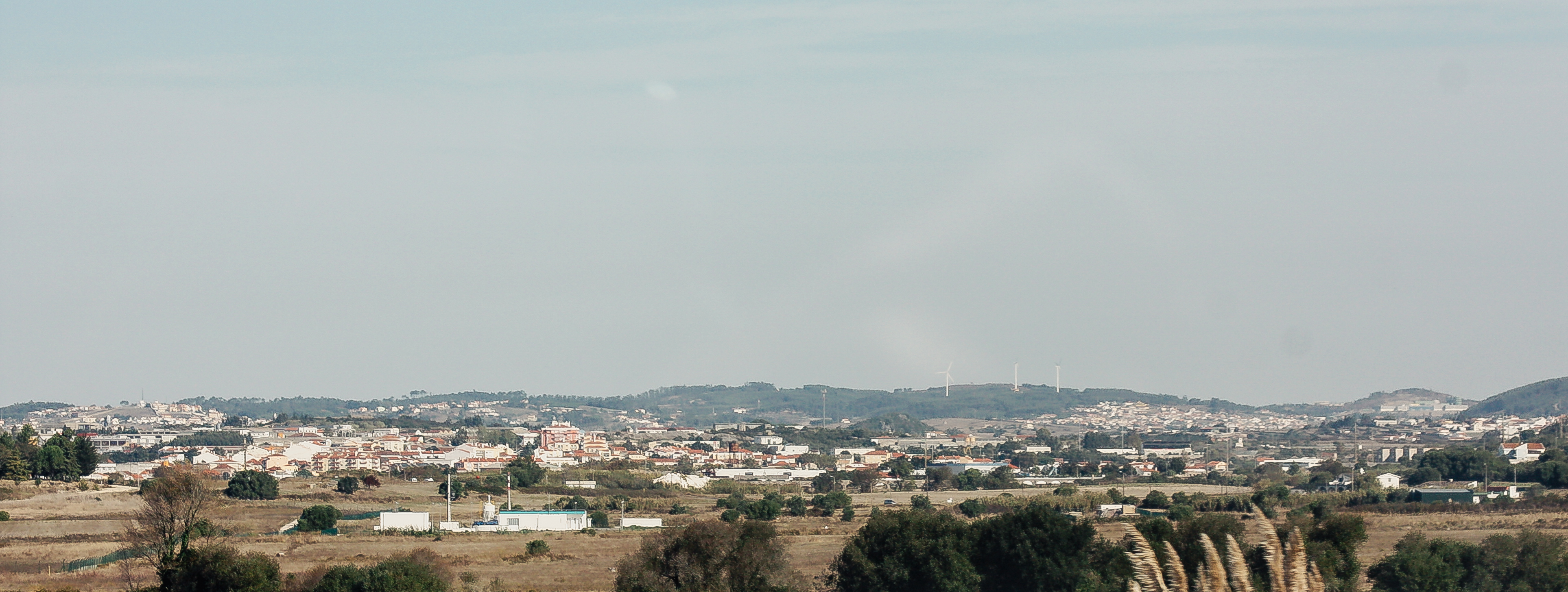 Panorama da zona da Granja do Marquês em direção Cortegaça/Pero Pinheiro/Almargem do Bispo.